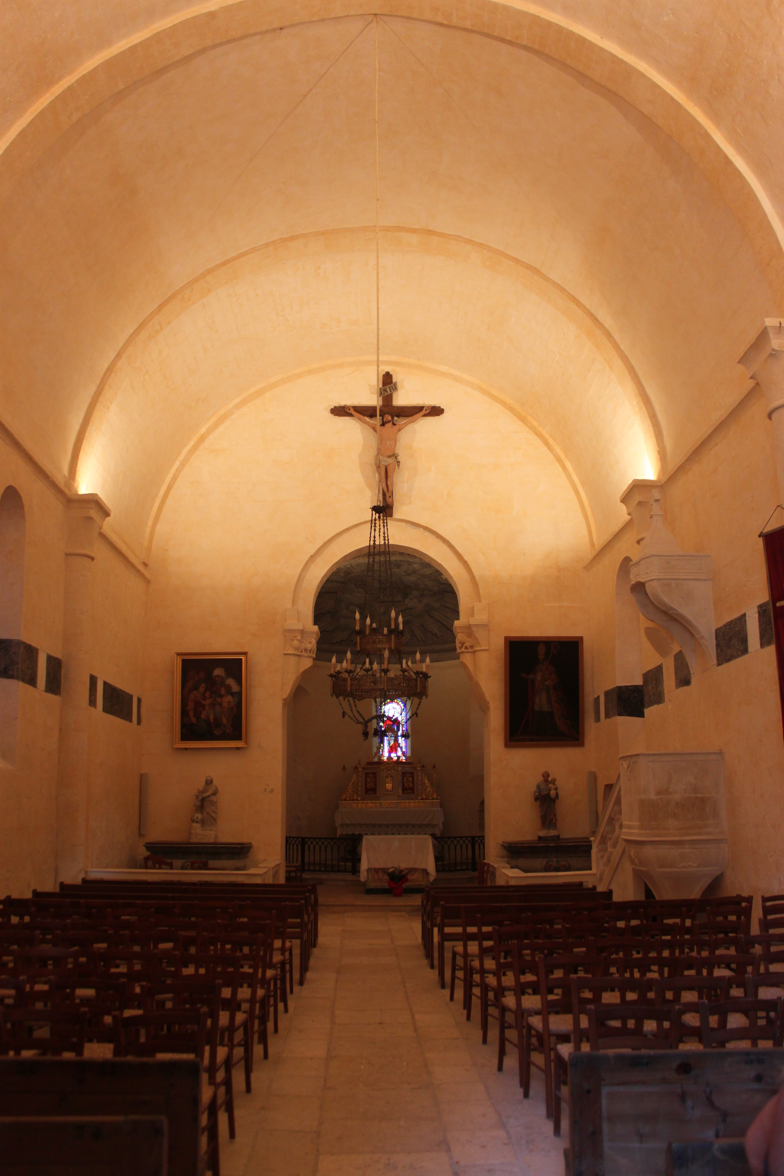 Nef, église Saint-Martial, Fr-17-le Douhet.